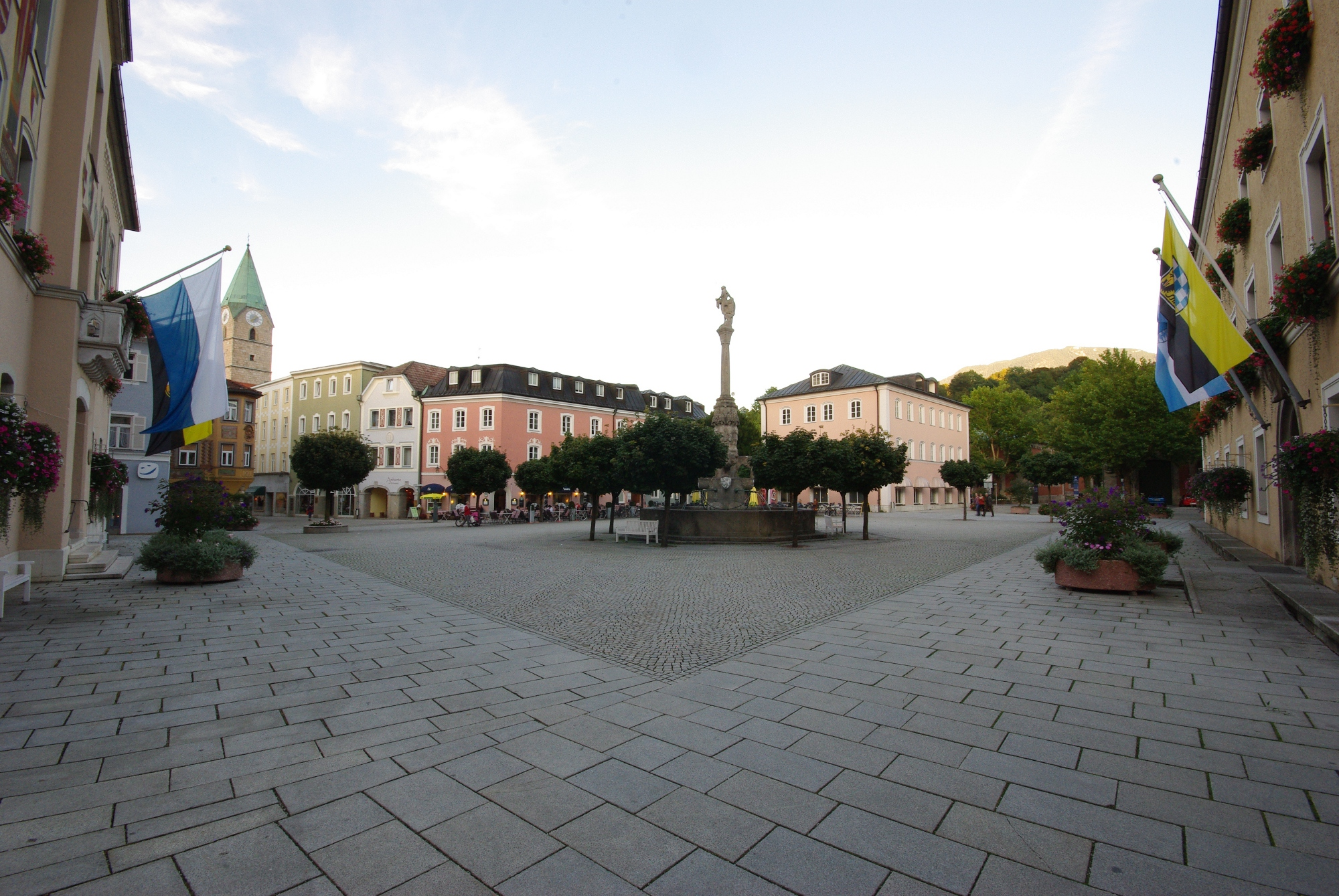 Ensemble Rathausplatz, 83435 Bad ReichenhallThis is a photograph of an architectural monument.